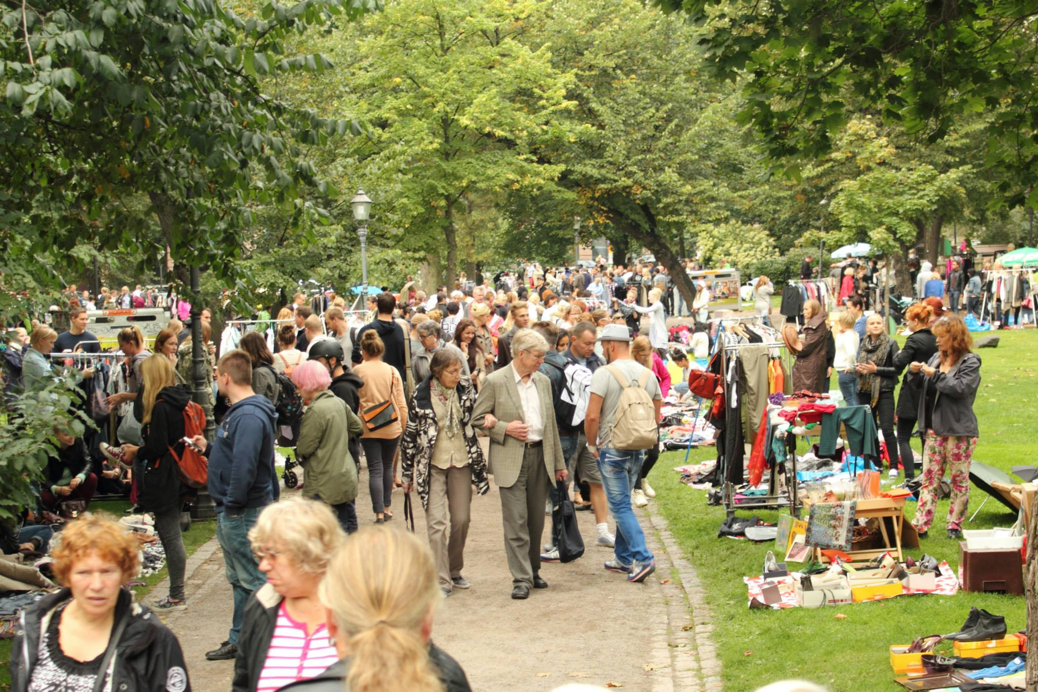 Siivouspäivä 31.8.2013, Vanha kirkkopuisto, Helsinki